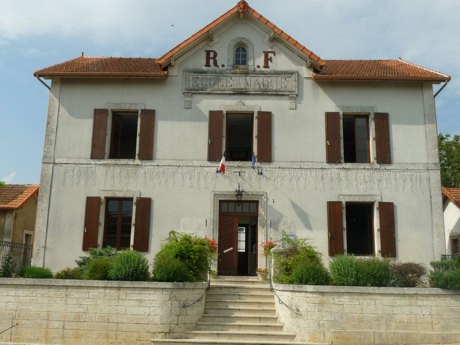 mairie de St-Laurent-de-Céris, Charente, France